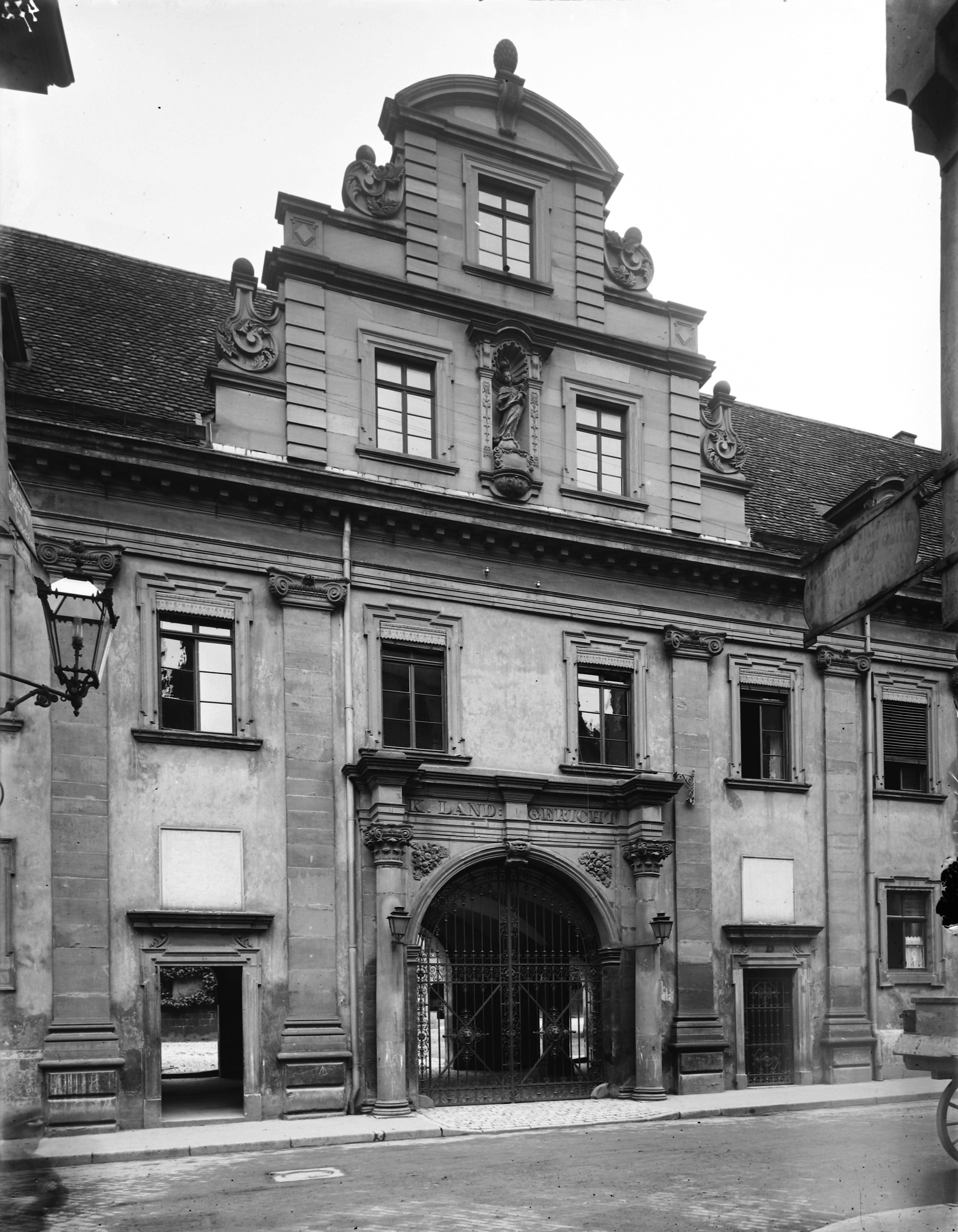 Das Königliche Landgericht im Heilbronner Deutschhof